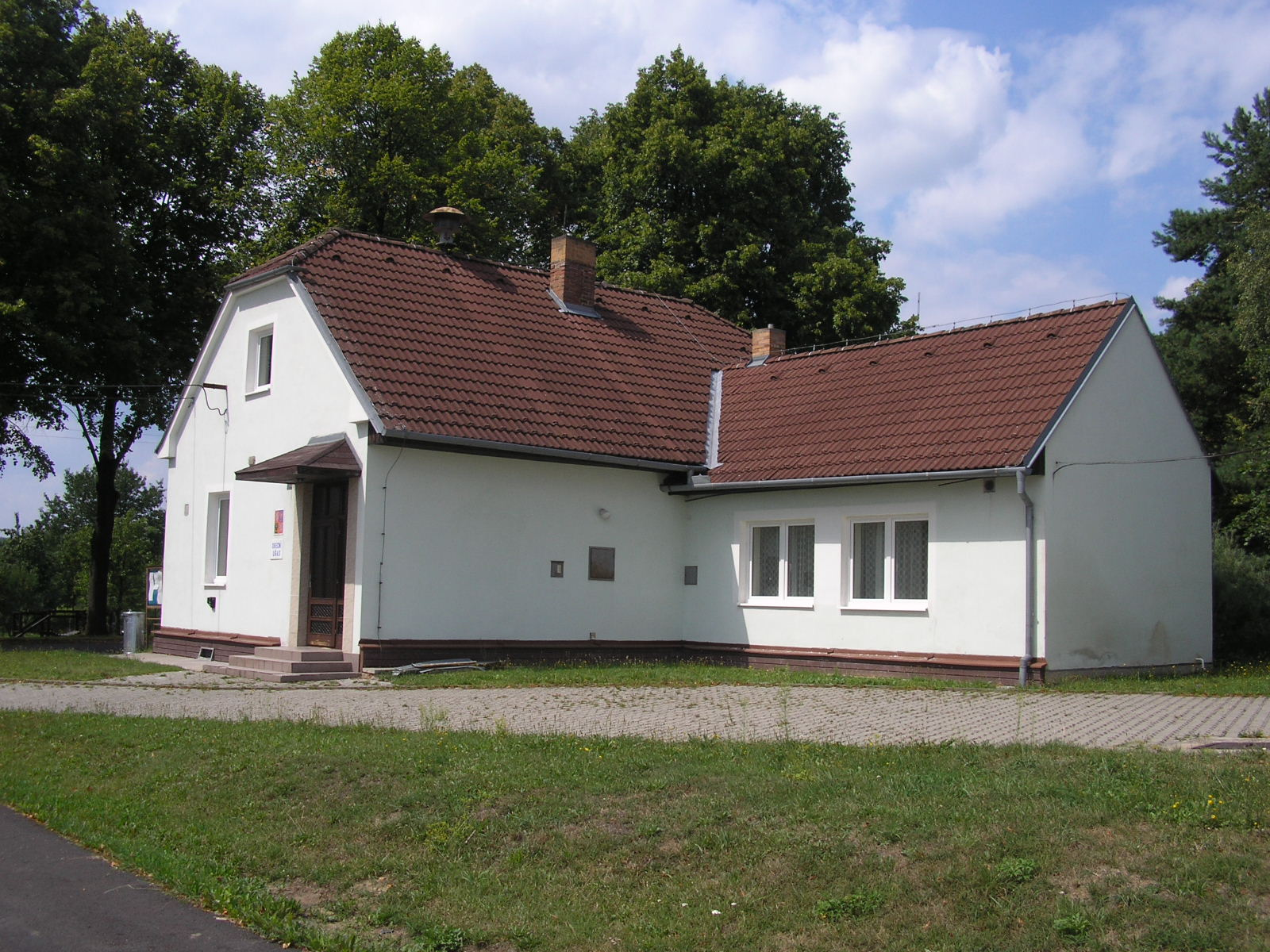 Obecní úřed města Nýrov